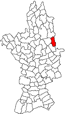 Categorie:Hărţi ale judeţului Olt